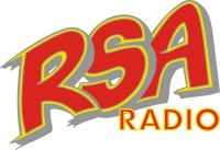 Senderlogo des bayerischen Lokalradios "RSA-Radio" aus Kempten.